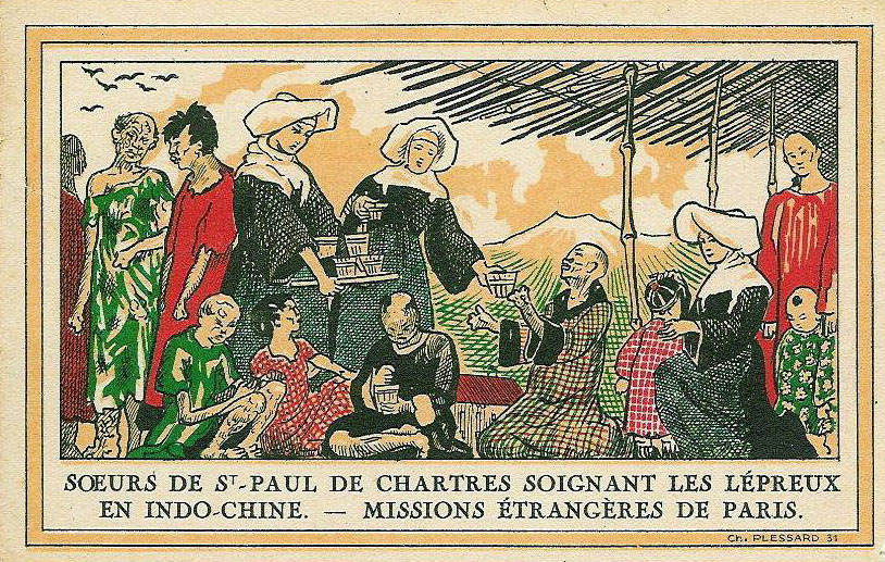 Religieuses de Saint-Paul de Chartres soignant les lépreux en Indochine (1931).